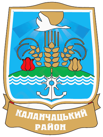 Герб Каланчацького району